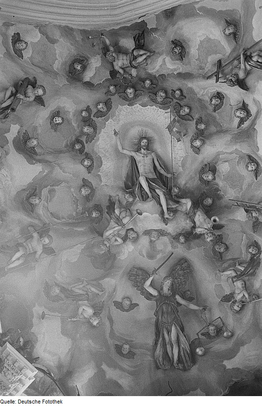 Original image description from the Deutsche Fotothek Gewölbe der kurfürstlichen Begräbniskapelle des Doms mit Gestaltung des Themas der Wiederkunft Christi